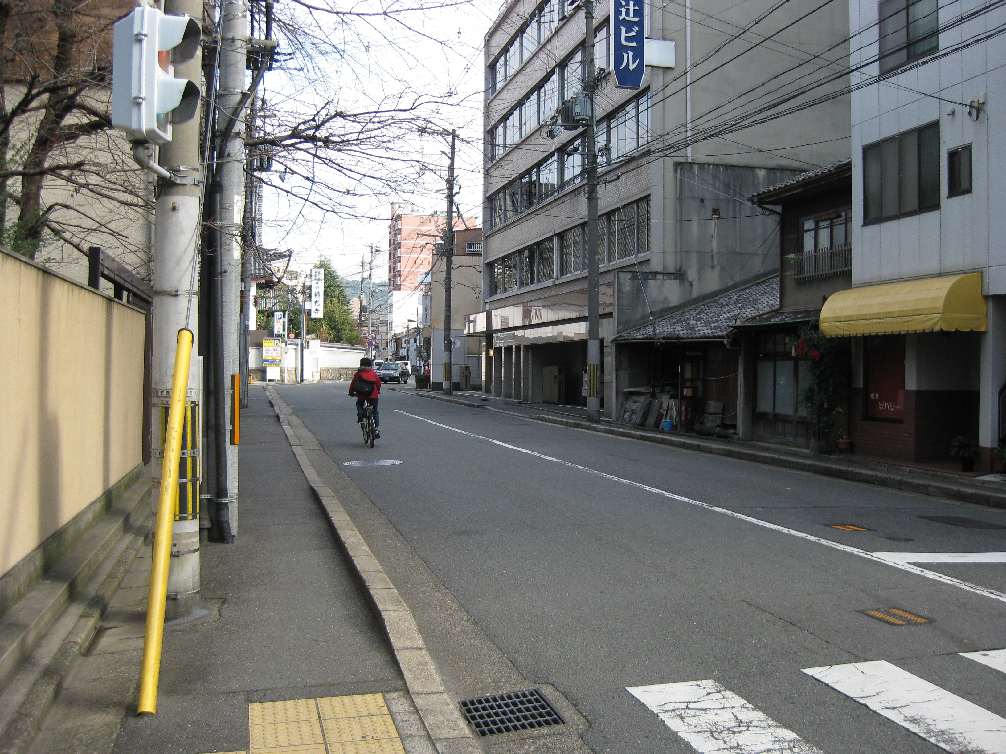 高辻通 京都市下京区 東洞院通との交差点から東方向